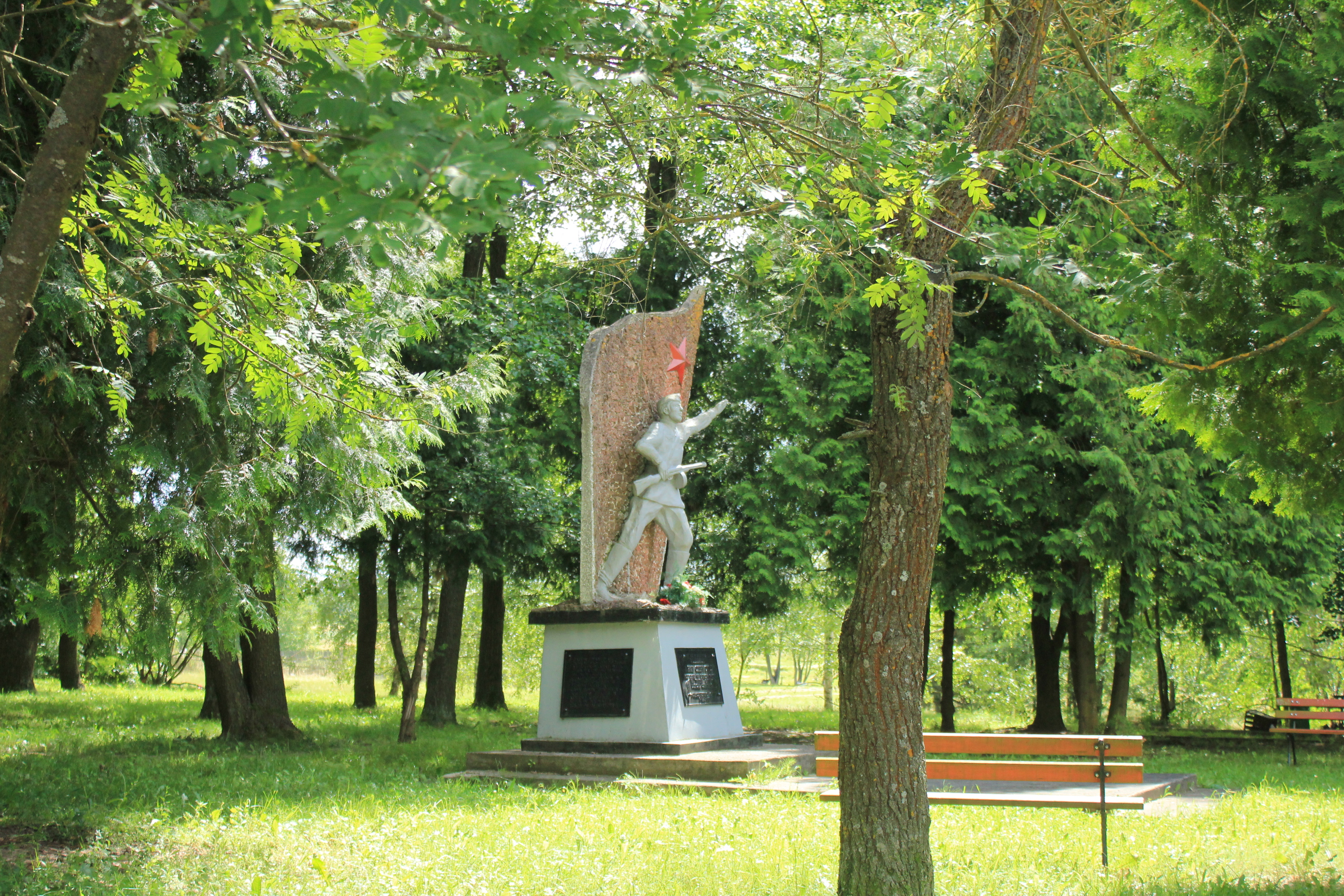 Dubicze Cerkiewne - pomnik czerwonarmistom, woj. podlaskie